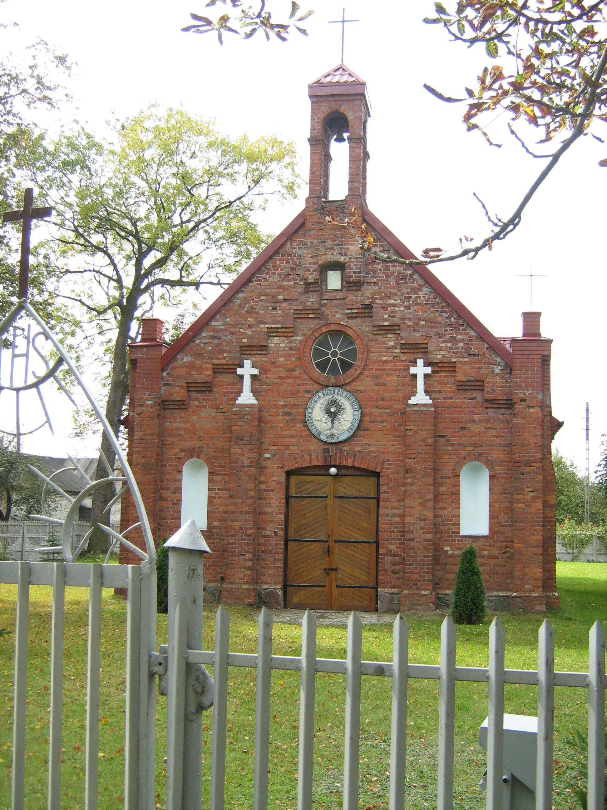 Catholic Mariavite Church in Dluga Koscielna (Poland) Kościół Katolicki Mariawitów w Długiej Kościelnej